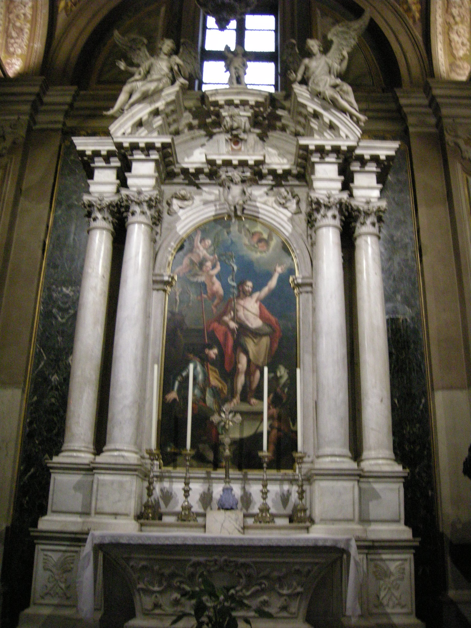 Duomo di udine, altare con santi giovanni battista e eustachio